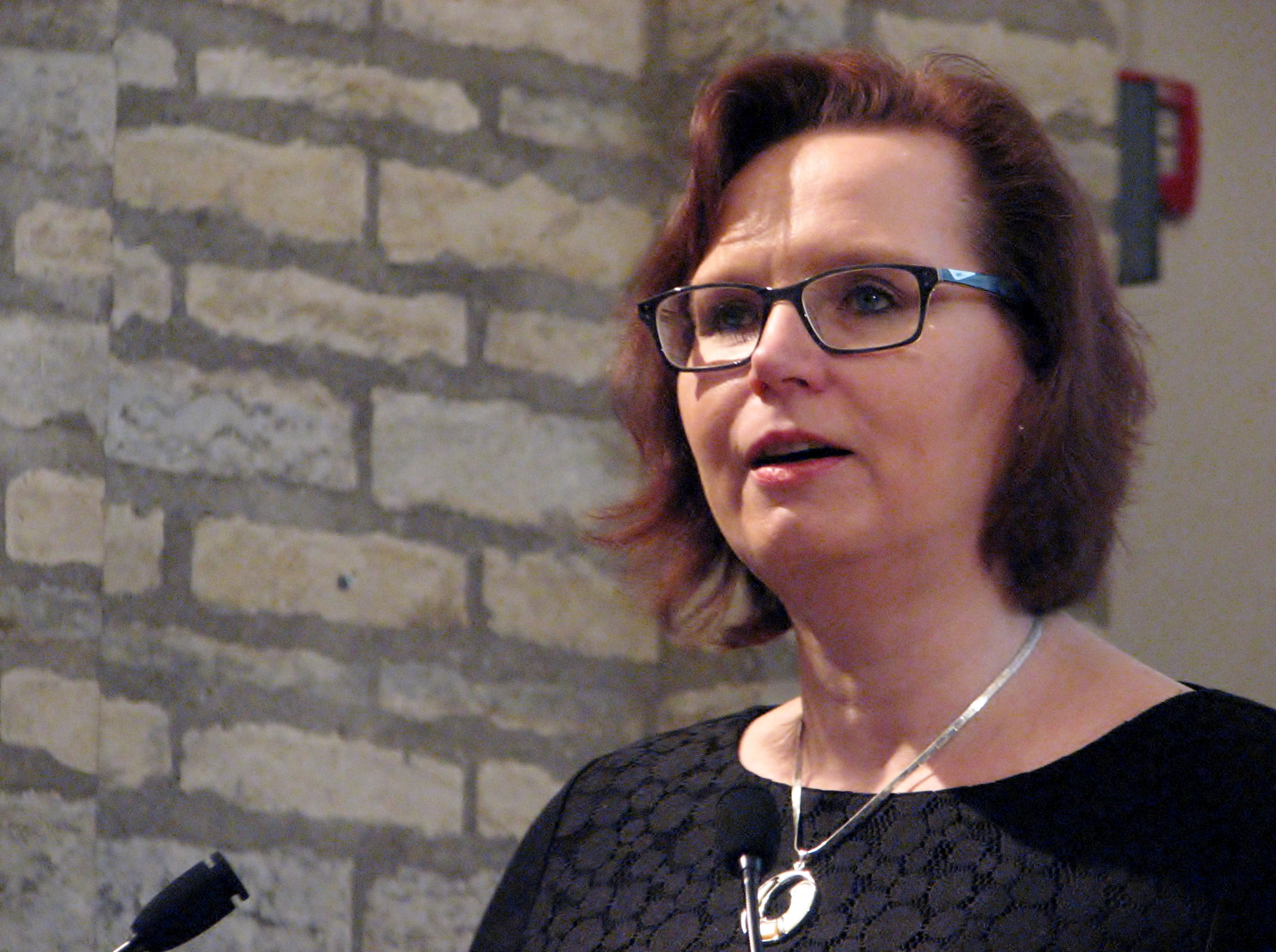 Katre Riisalu Eesti Raamatukoguhoidjate Ühingu koosolekul